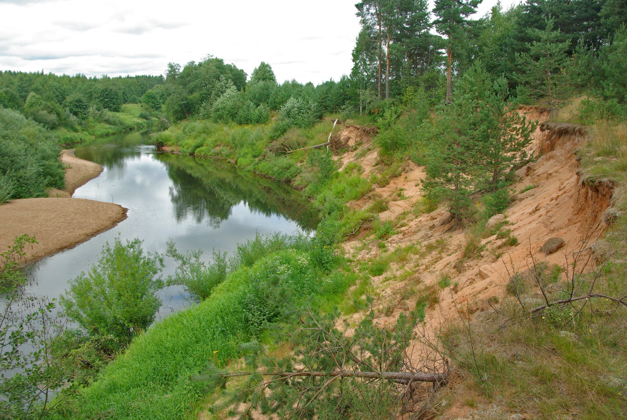 Река Холова, Крестецкий район This image is related to the protected area of Russia number 5310083